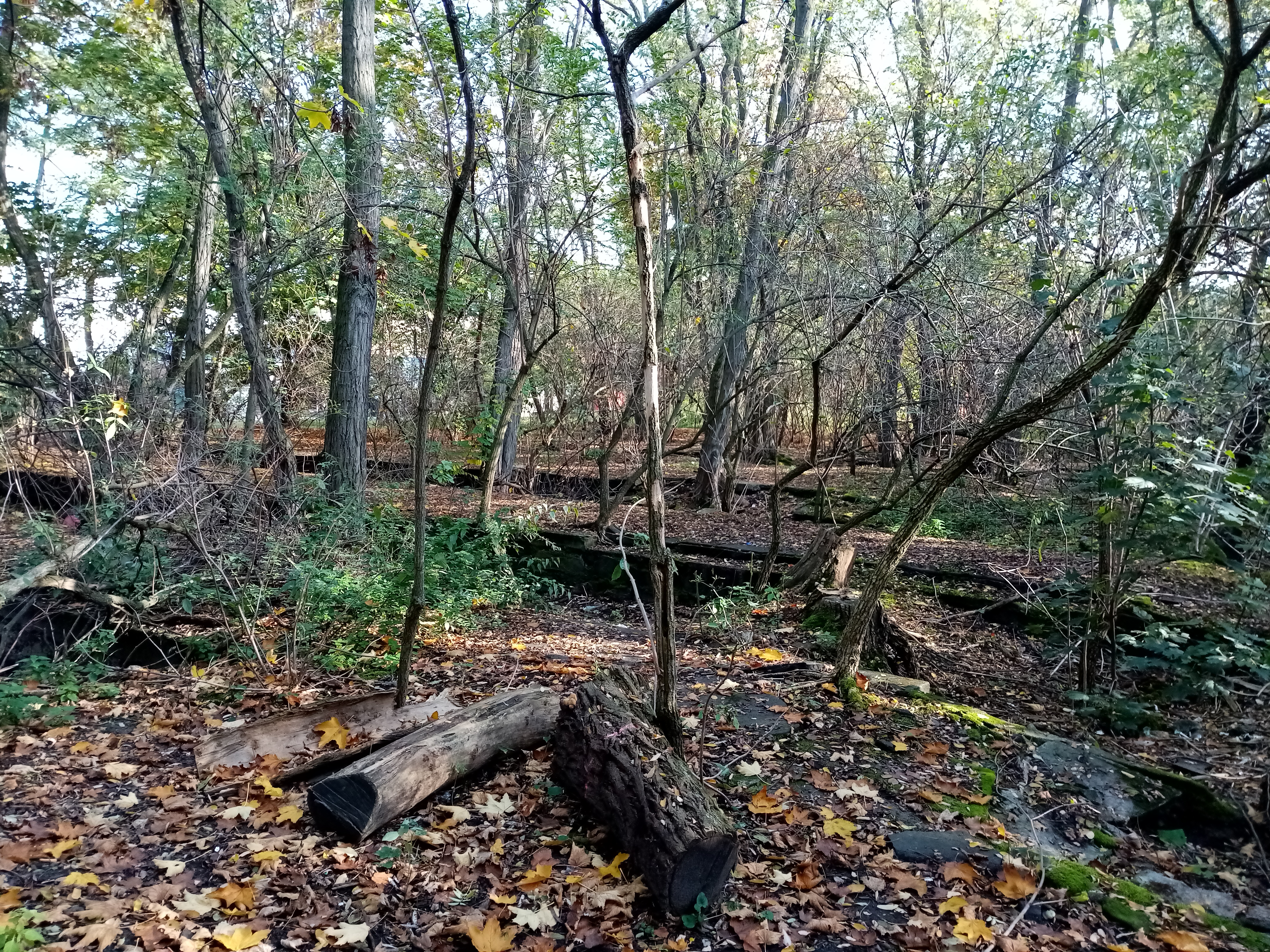 von der Natur erobertes Bahnsteigareal